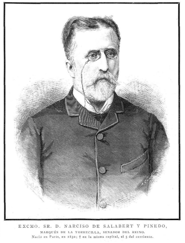 Grabado del 'Excmo. Sr. D. Narciso de Salabert y Pinedo'. La Ilustración Europea y Americana, 22 de noviembre de 1885.